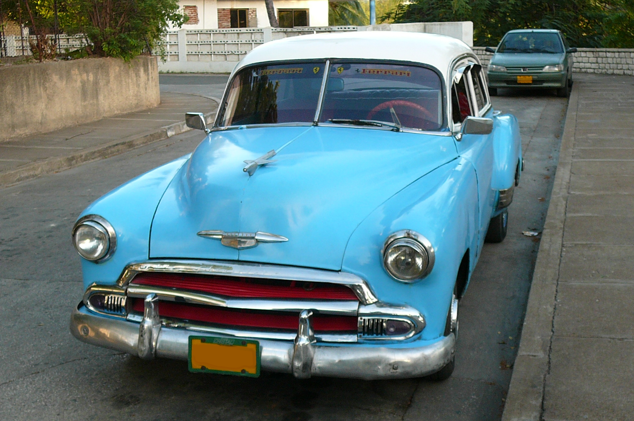 Motoryzacja na Kubie